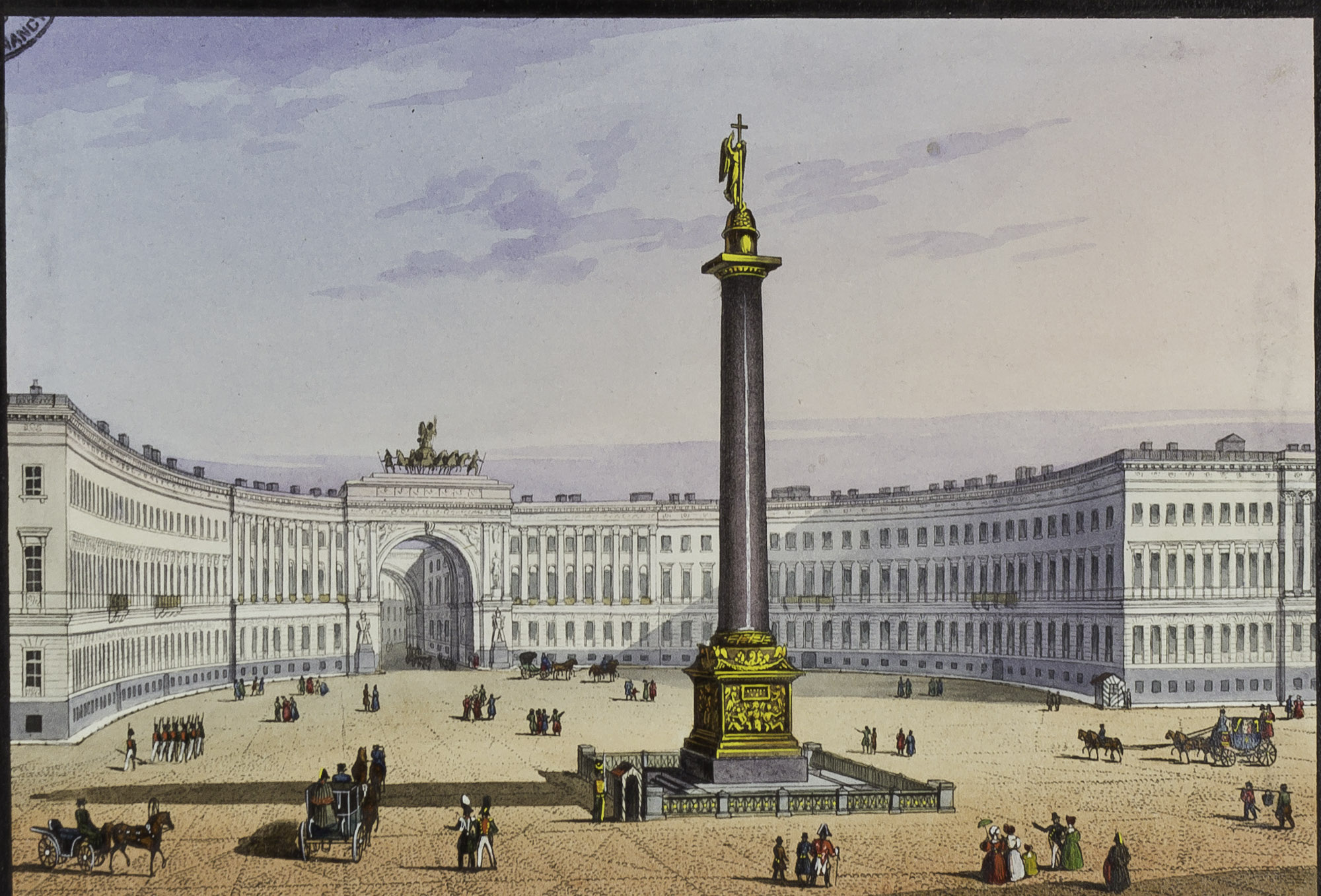 Enluminure de Ch. Beggrow, Saint Petersbourg.